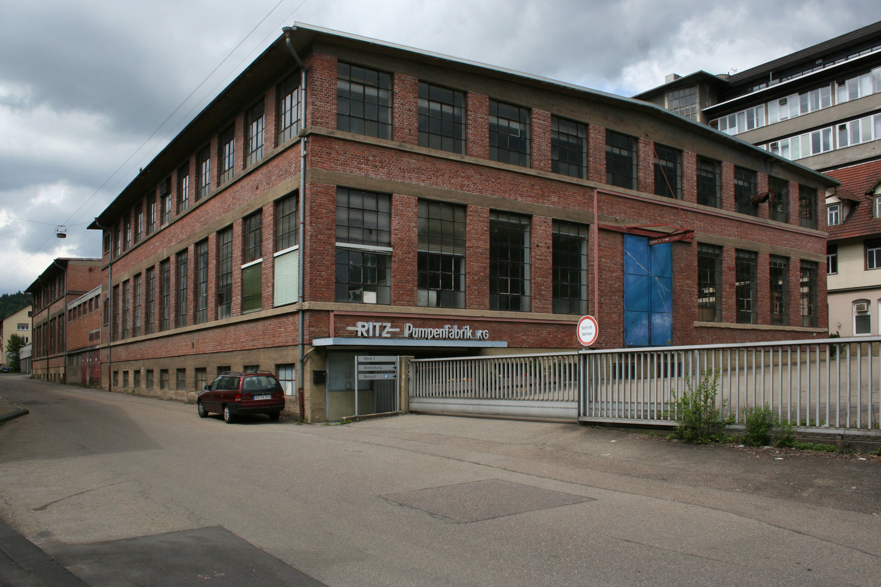 Werkhalle der Ritz Pumpenfabrik in Schwäbisch Gmünd, Deutschland von Süden